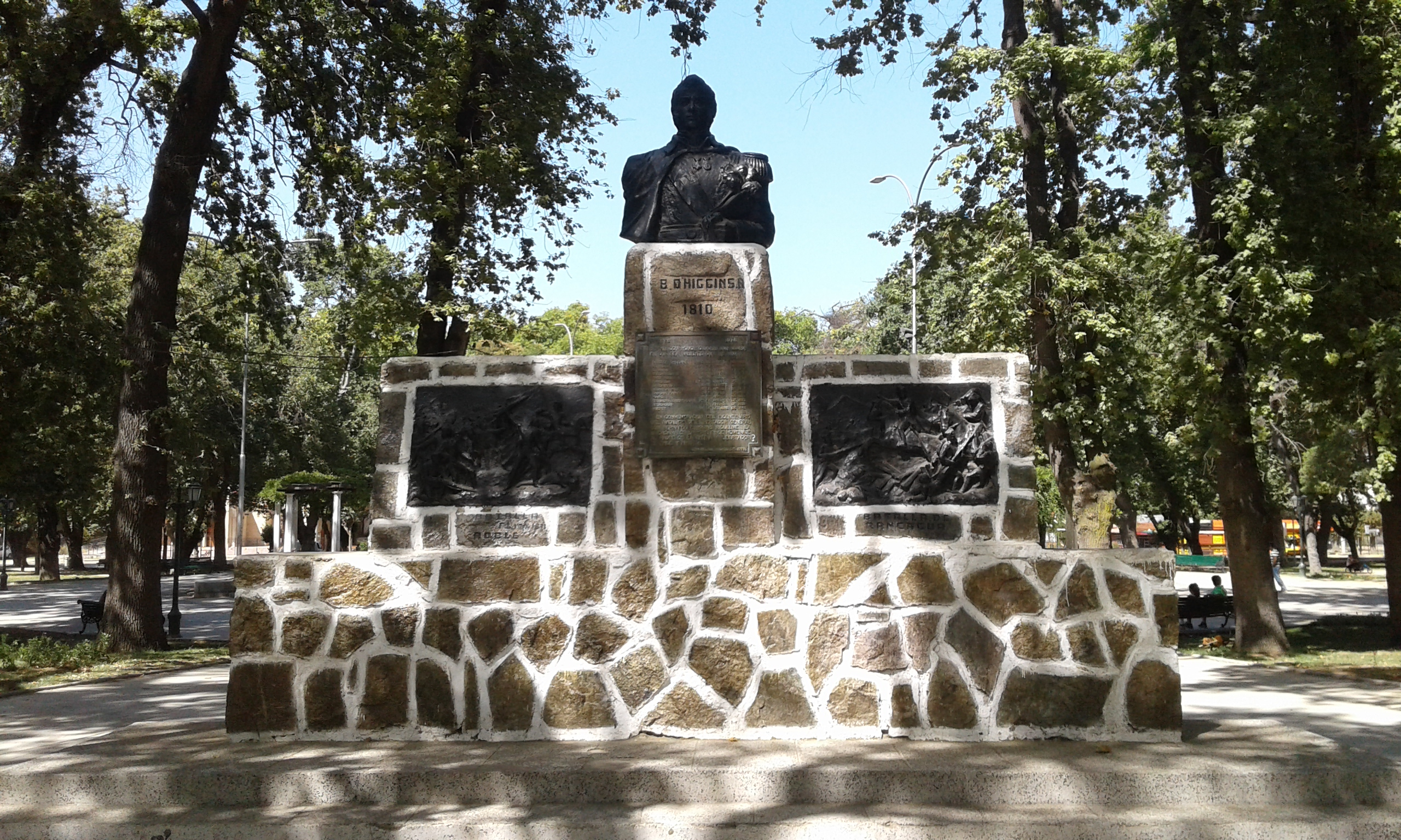 Monumento a Bernardo O'Higgins en parque Brasil en Limache, Chile.